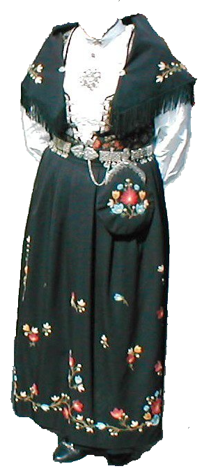 Frafjordbunad.